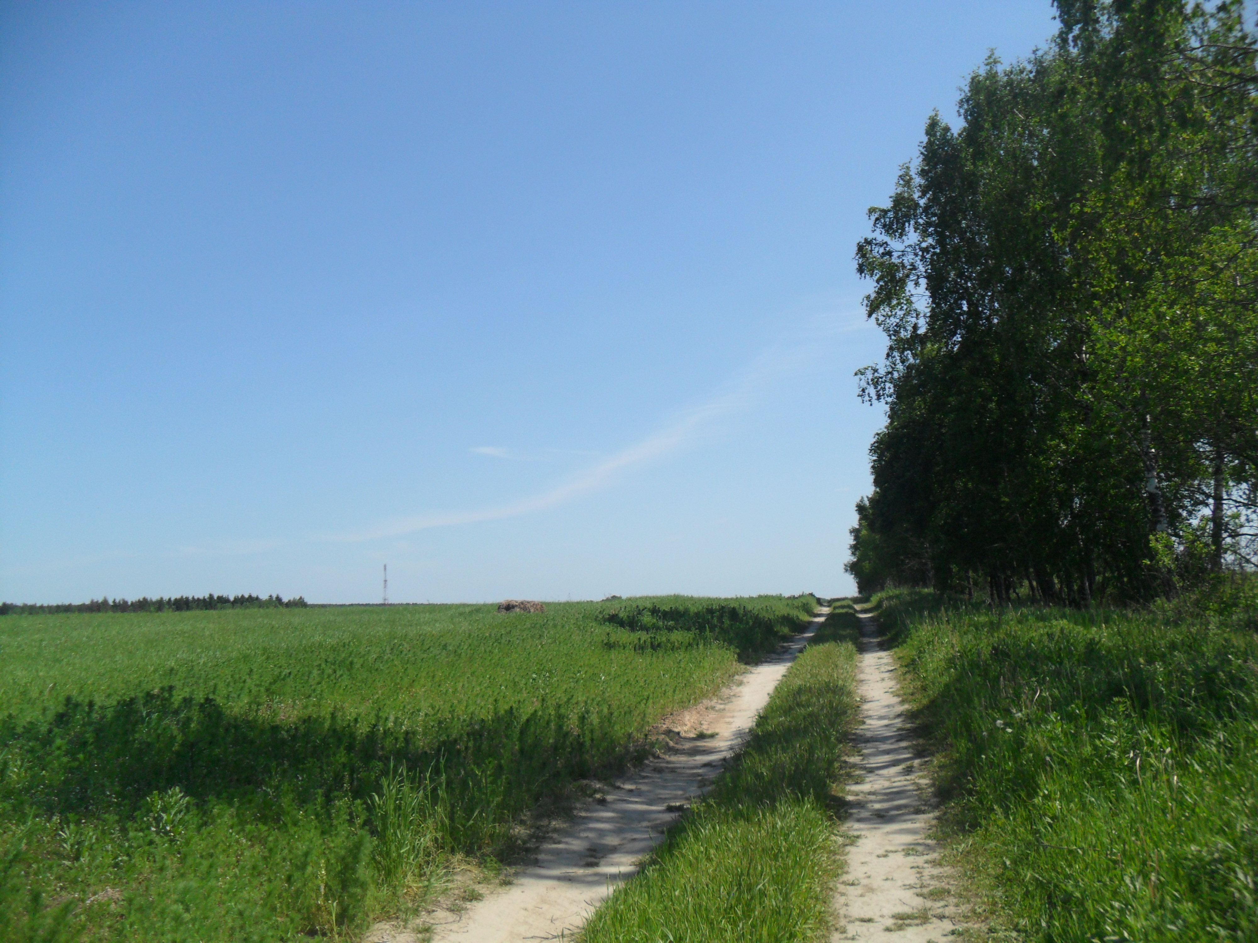 Поле рядом с деревней Грибцово (Рузский район) МО.